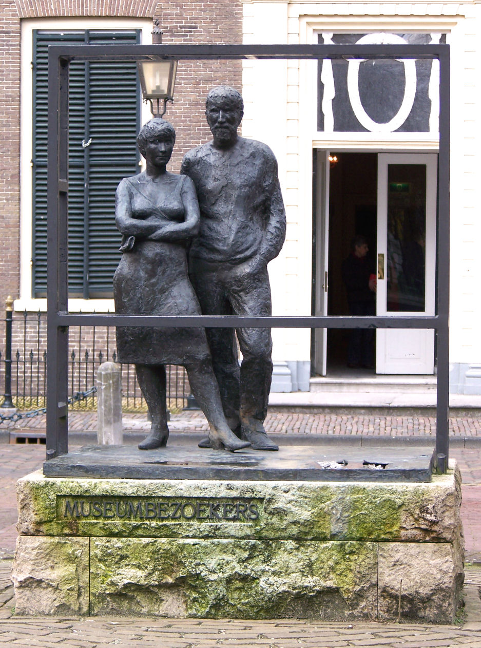 Museumbezoekers, door Bert Kiewiet (1985) aan het Jacob Cramerplein in Assen